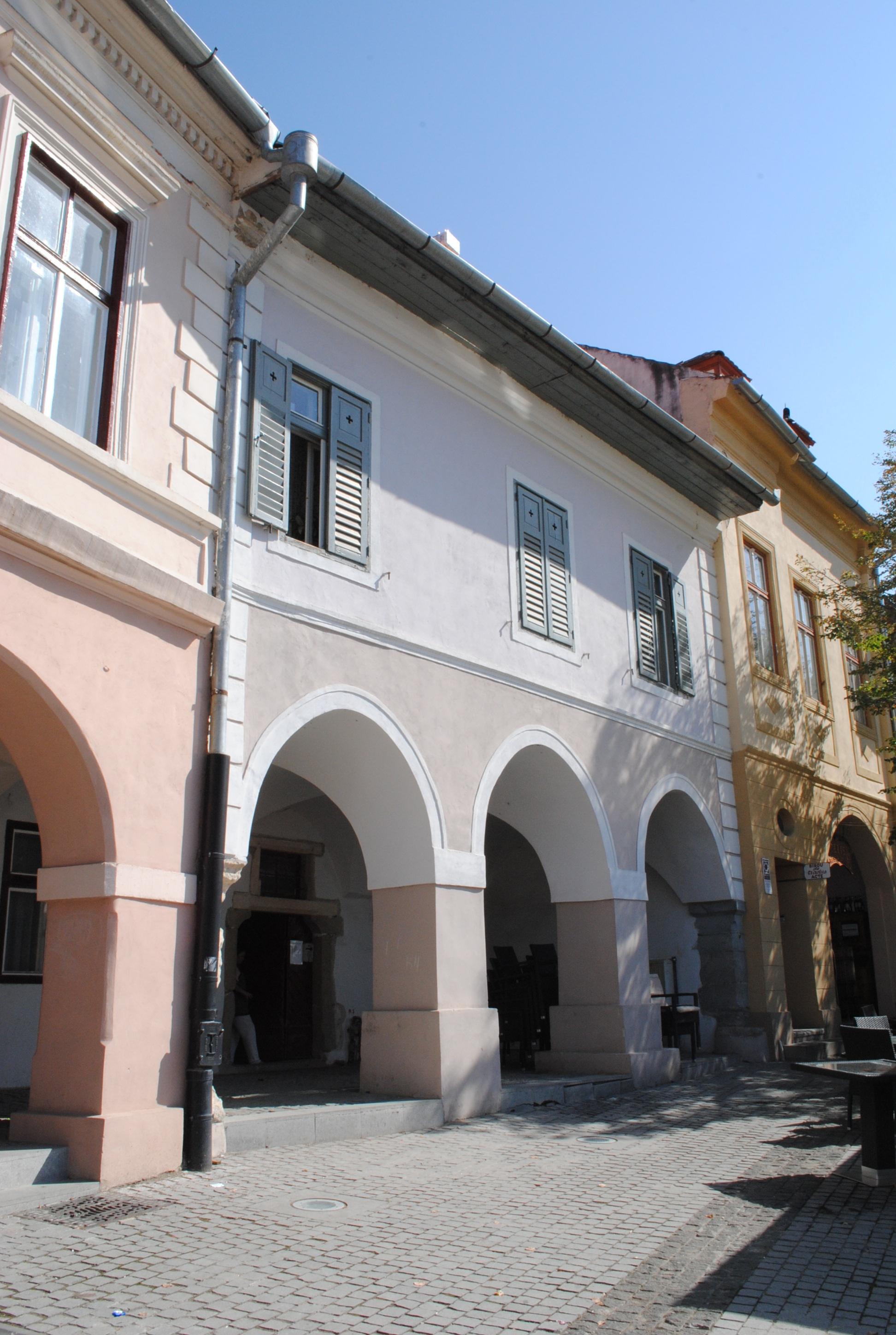 Casă, sec. XV - XVI, sec. XVIII